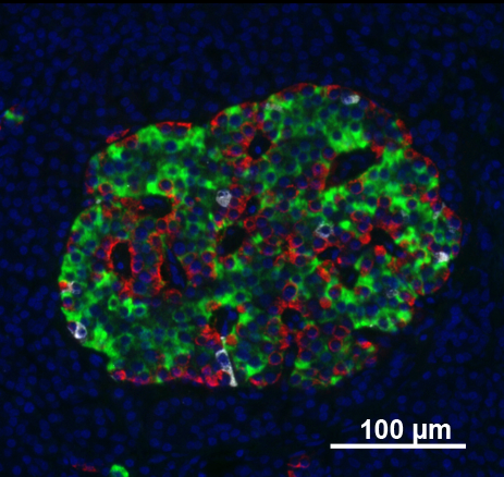 Figura 3. Morfología de islotes seleccionados al azar. Se muestra un islote “in situ” de páncreas humano, en colores y con gran aumento. El islote muestra la habitual disposición compacta de las células endócrinas en su interior. La arquitectura del islote es característica y está mantenida en las diferentes especies. Sujeto: 41 años sano. Inmunohistoquímica: tinción para insulina (verde), glucagón (rojo), somatostatina (blanco) y núcleos (azul).